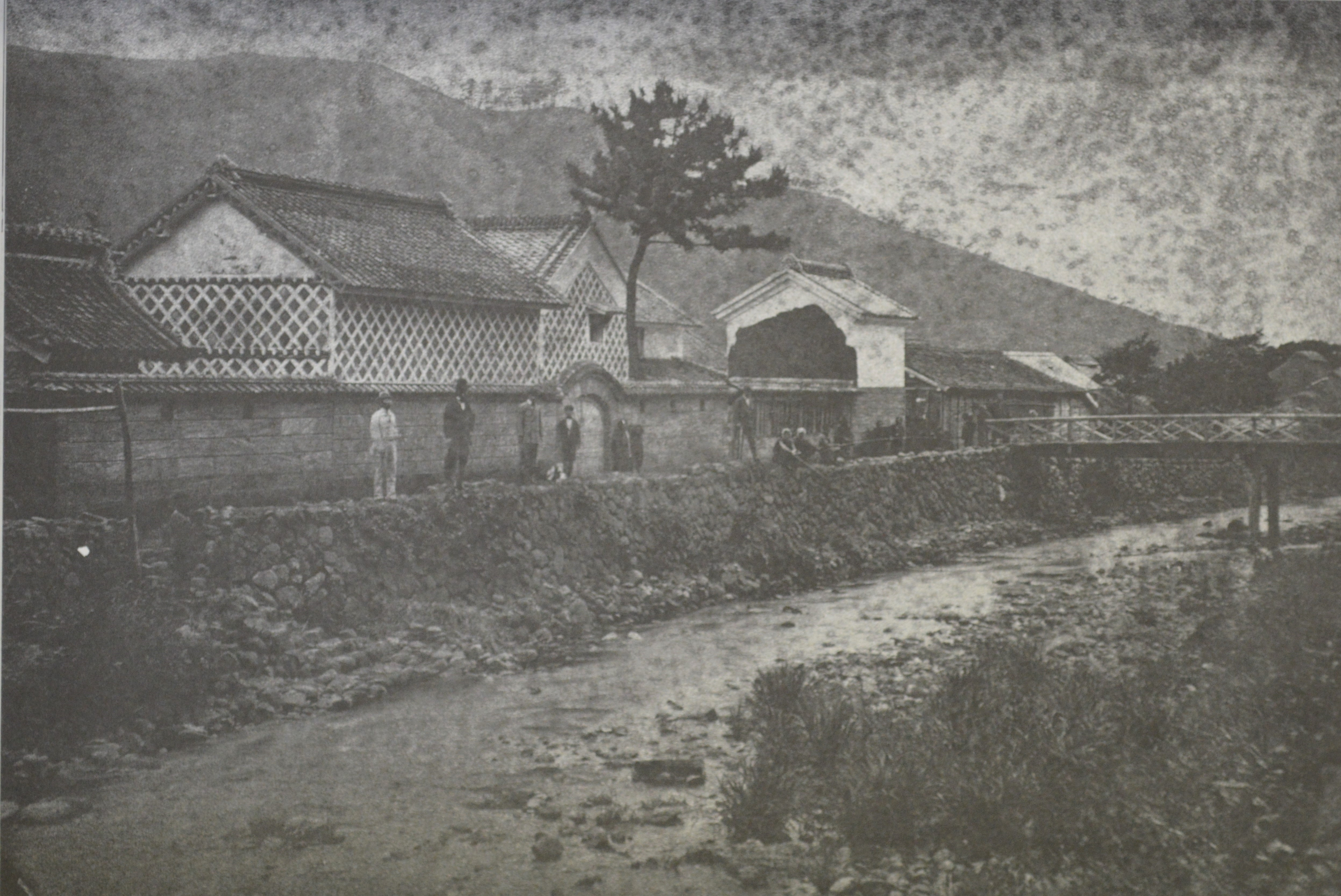 静岡県田方郡戸田村を流れる鬼川と松城家（松城家住宅、松城邸）。明治時代。鬼川は1970年代に埋め立てられた。